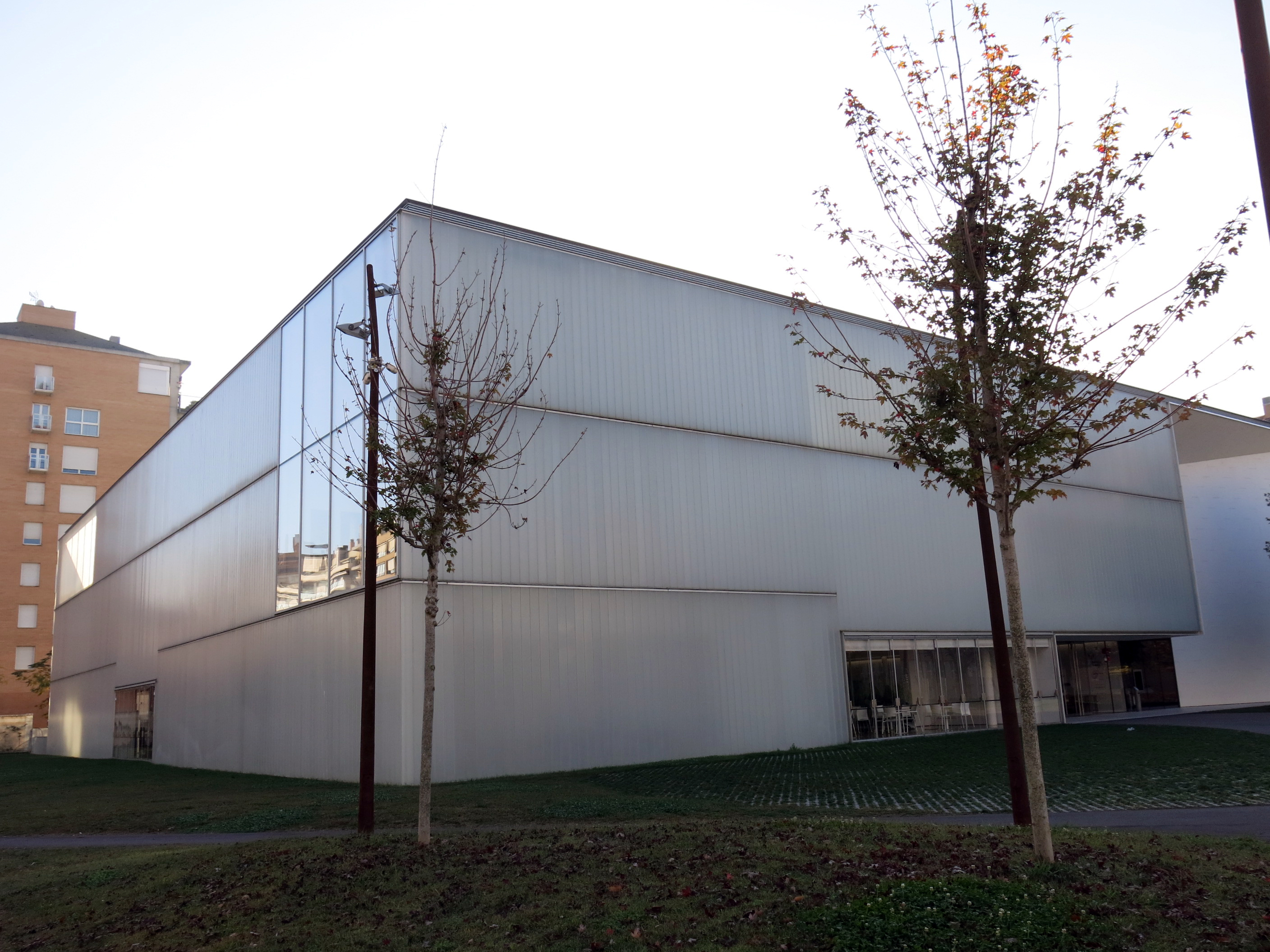 Biblioteca Carles Rahola, c. Emili Grahit (Girona)